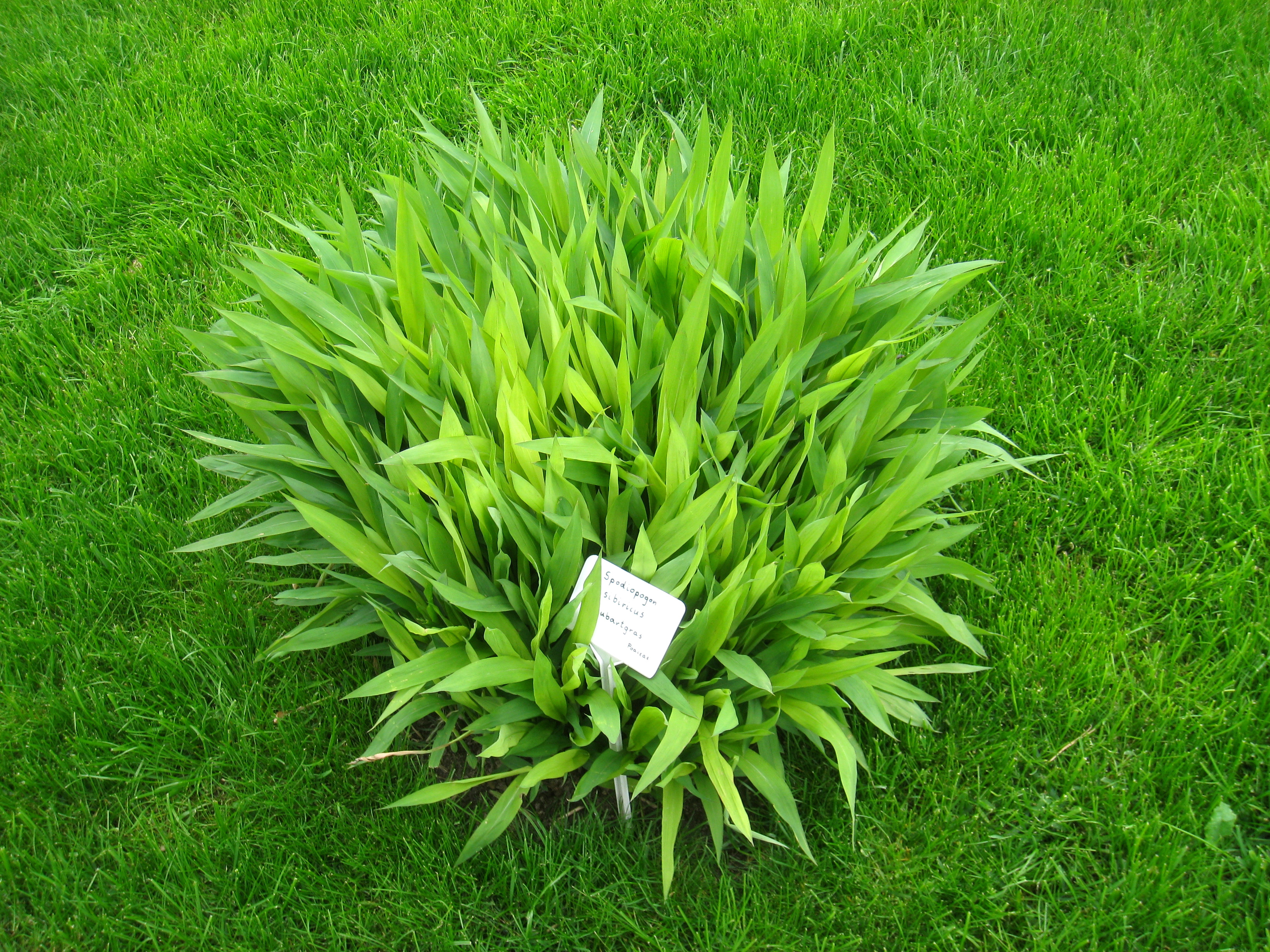 Spodiopogon sibiricus specimen in the Botanischer Garten, Berlin-Dahlem (Berlin Botanical Garden), Berlin, Germany.